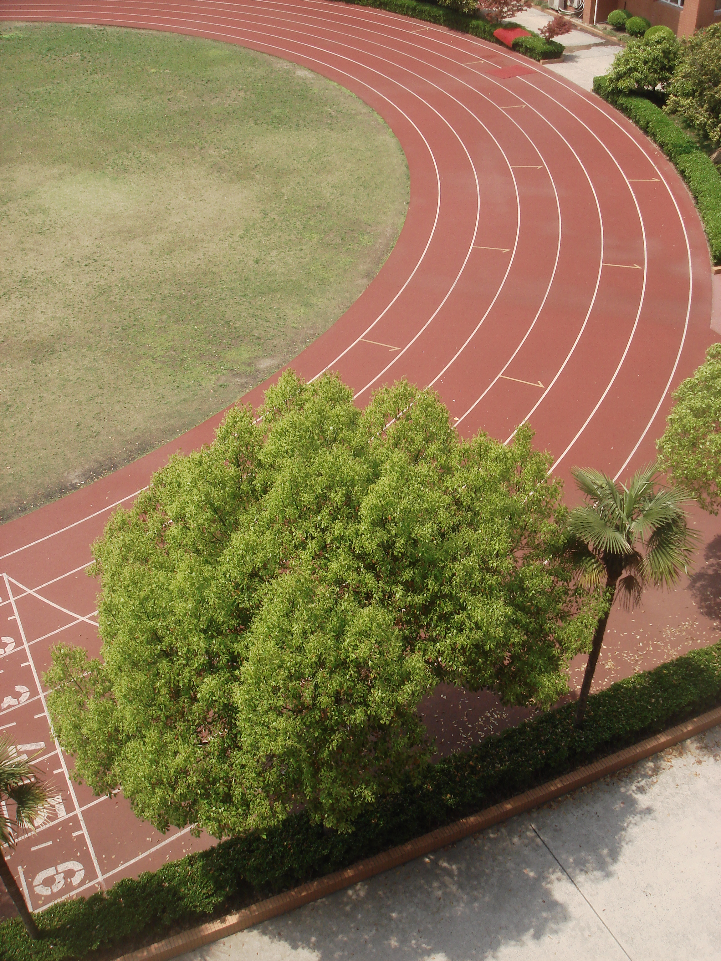 徐汇中学的操场跑道。